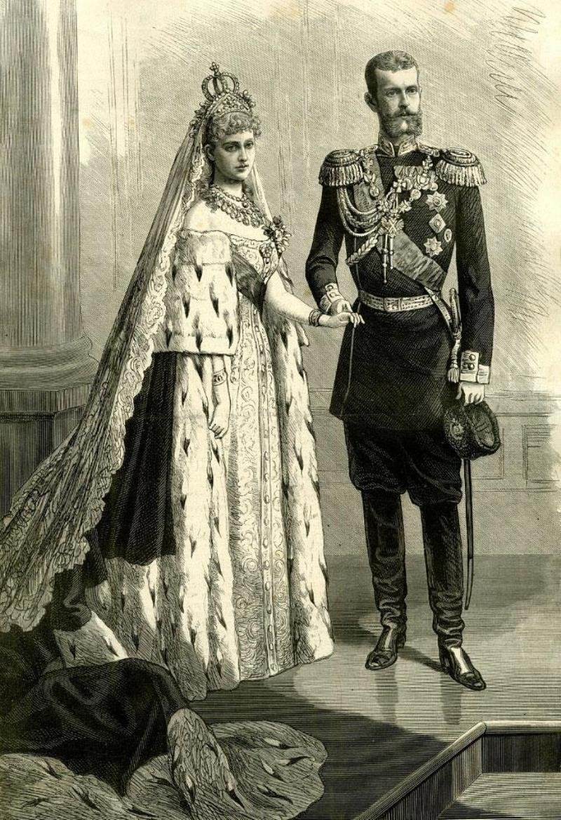 3 (15) июня 1884 года в Придворном соборе Зимнего дворца Принцесса Елизавета венчалась браком с великим князем Сергеем Александровичем